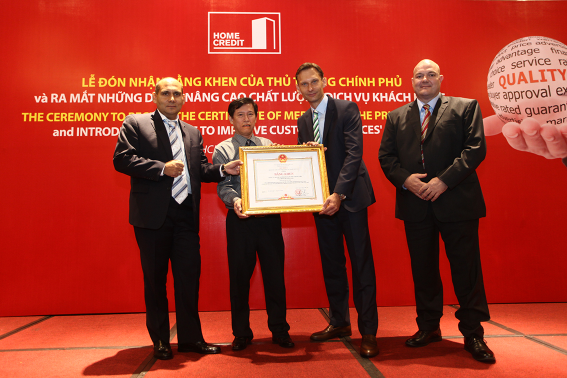 Home Credit Vietnam nhận bằng khen của Thủ tướng Chính phủ